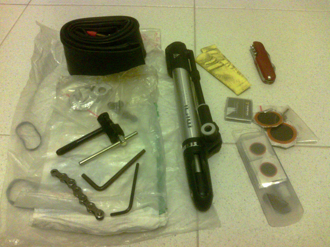 Alcuni attrezzi e ricambi usati nel mountain biking